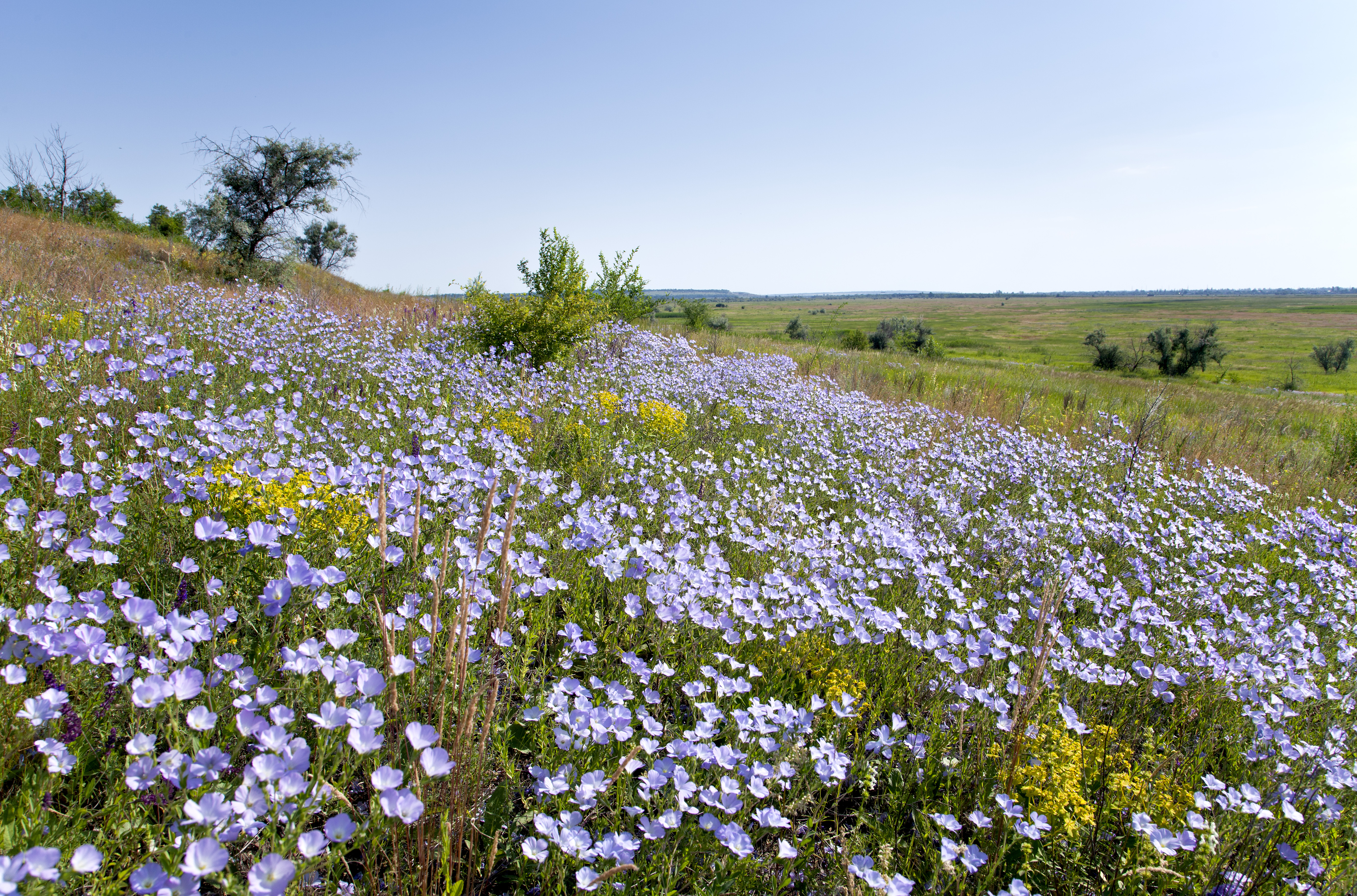 Отченашкові наділи, Дніпропетровський р-н, м. Підгородне